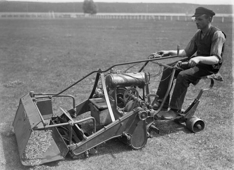 Tempo unserer Zeit! Eine moderne elektrische Grasmähmaschine, wie sie in den öffentlichen Anlagen der Grosstadt Berlin Verwendung findet. Riesengrosse Rasenflächen werden in kurzer Zeit gemäht.